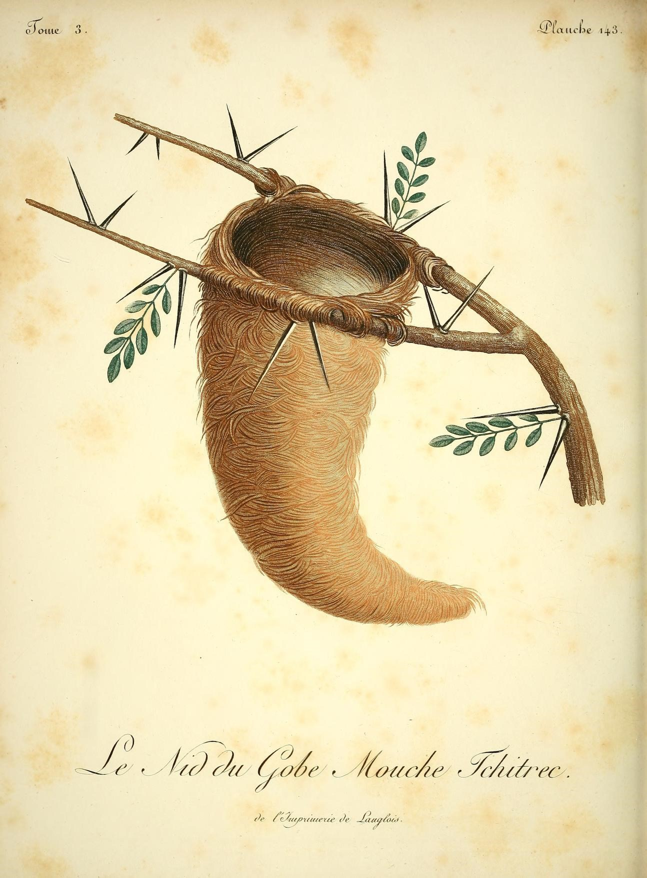 Nid du Gobe Mouche Tchirec (Terpsiphone viridis), Biodiversity Heritage Library n281_w1150 Histoire naturelle des oiseaux d'Afrique /. A Paris :Chez J.J. Fuchs, libraire